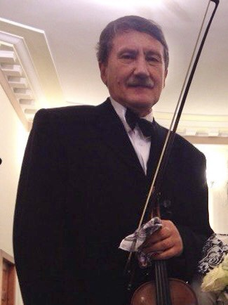 Сергей Евдокимов